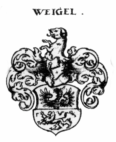 Wappen der Nürnberger Patrizierfamilie Weigel